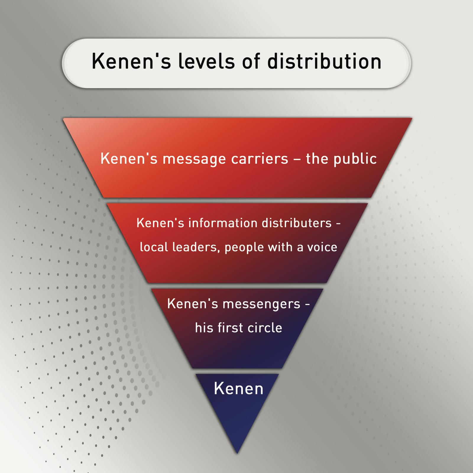 מודל הפצת מידע באיפא"ק כמתואר בספרו של החוקר קובי ברדה